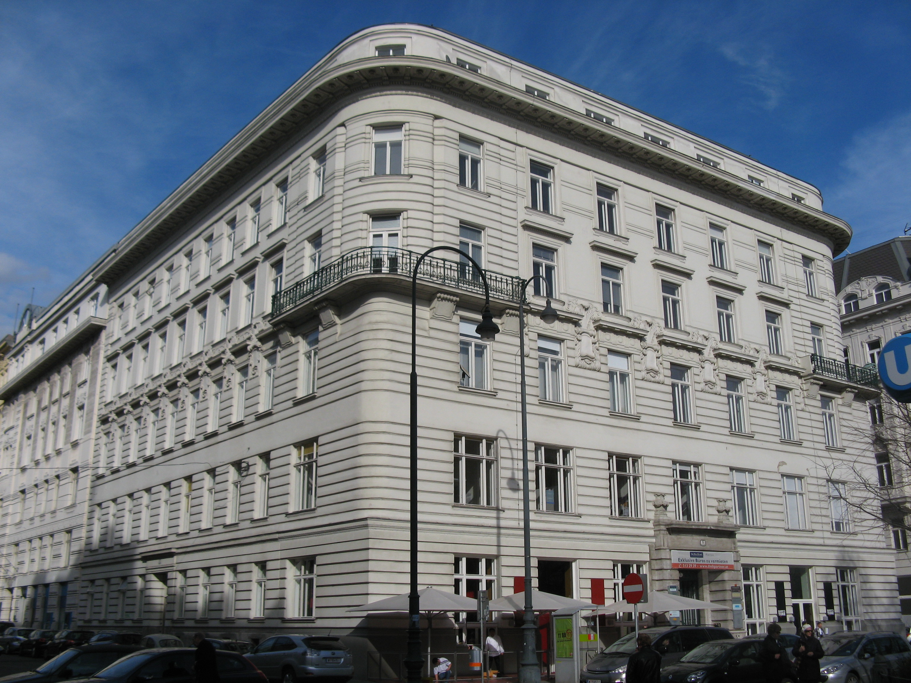 Haus Nr. 5 (1902-03) von Leopold Simony, Dr.-Karl-Lueger-Platz, Wien-Innere Stadt